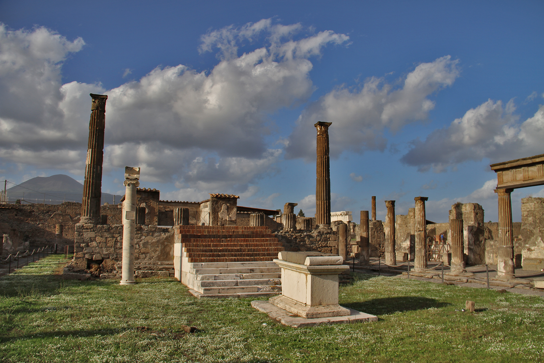 Pompei 5058